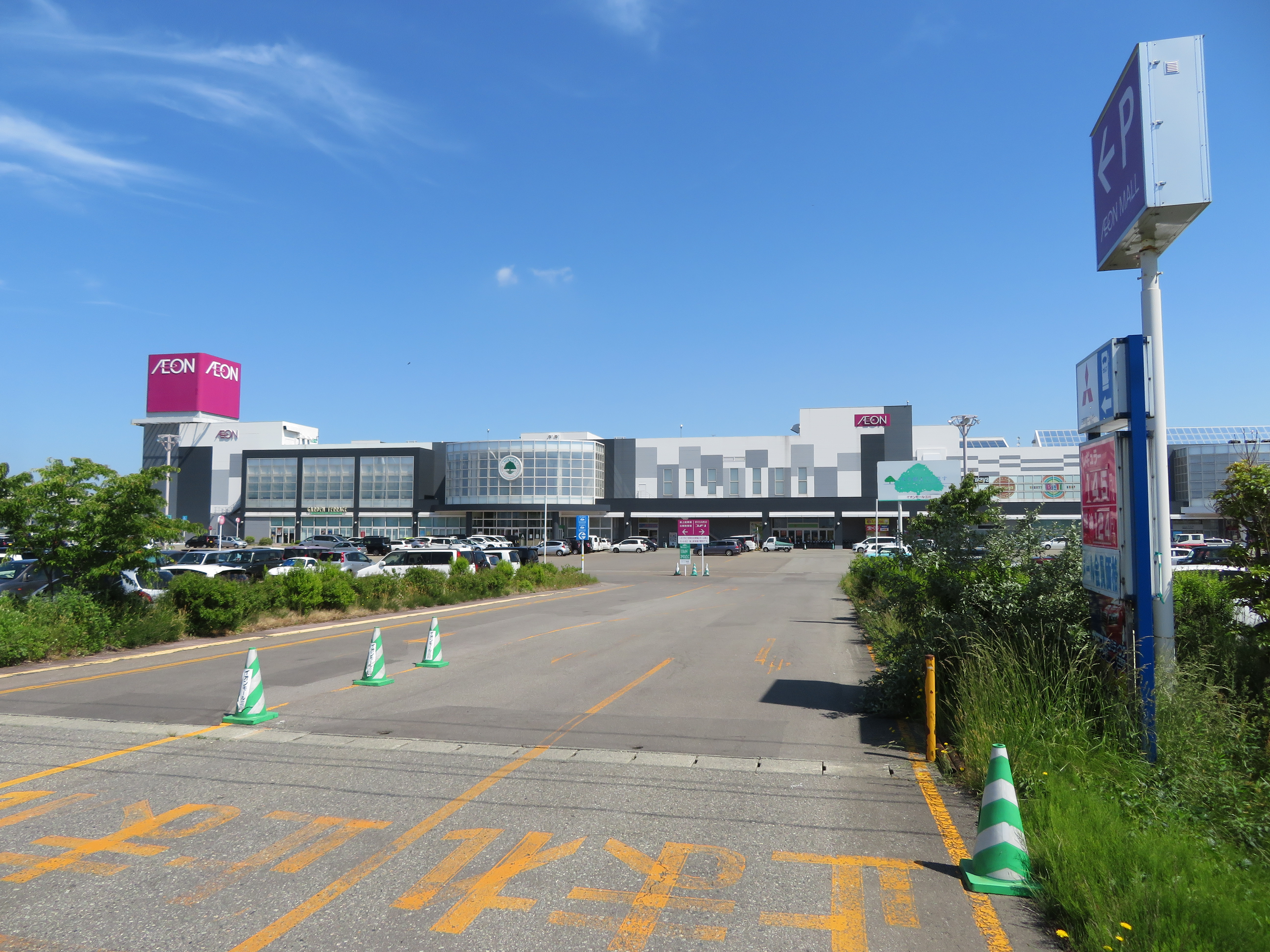 山形県東田川郡三川町に所在するイオンモール三川 Canon PowerShot SX720 HS